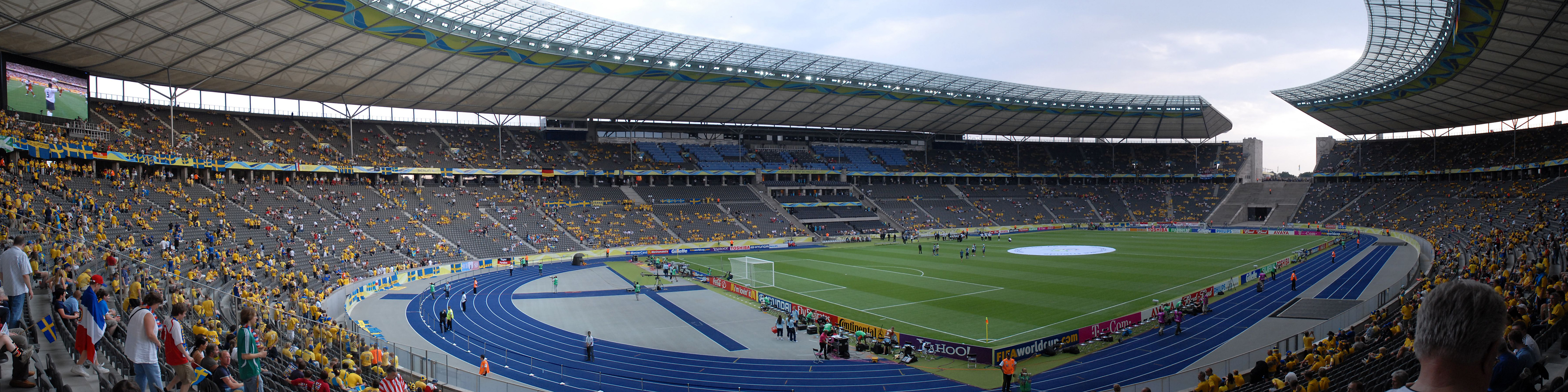 Do, 15. Juni 2006, 21 Uhr in Berlin Schweden – Paraguay 1:0 (0:0) Panorama vor Spielbeginn. von hier aufgenommen